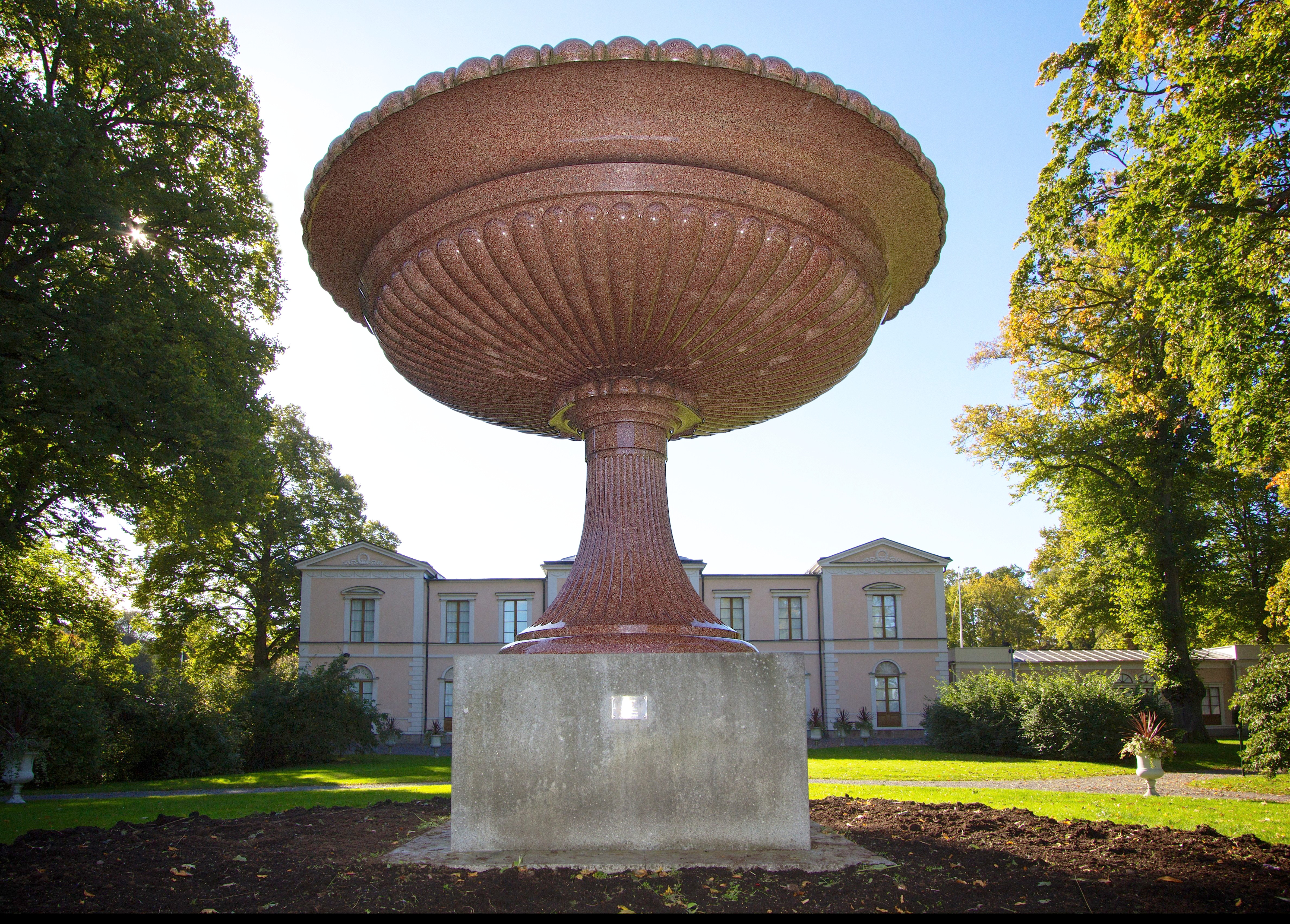 Vase in Garberg granite, Älvdalens Porfyrverk, 1825